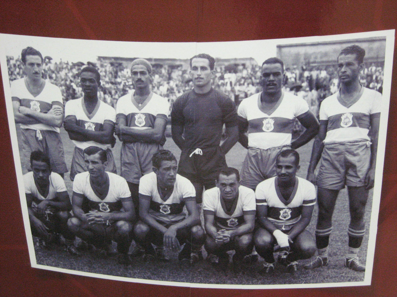 Equipe do Olaria AC nos anos 50.